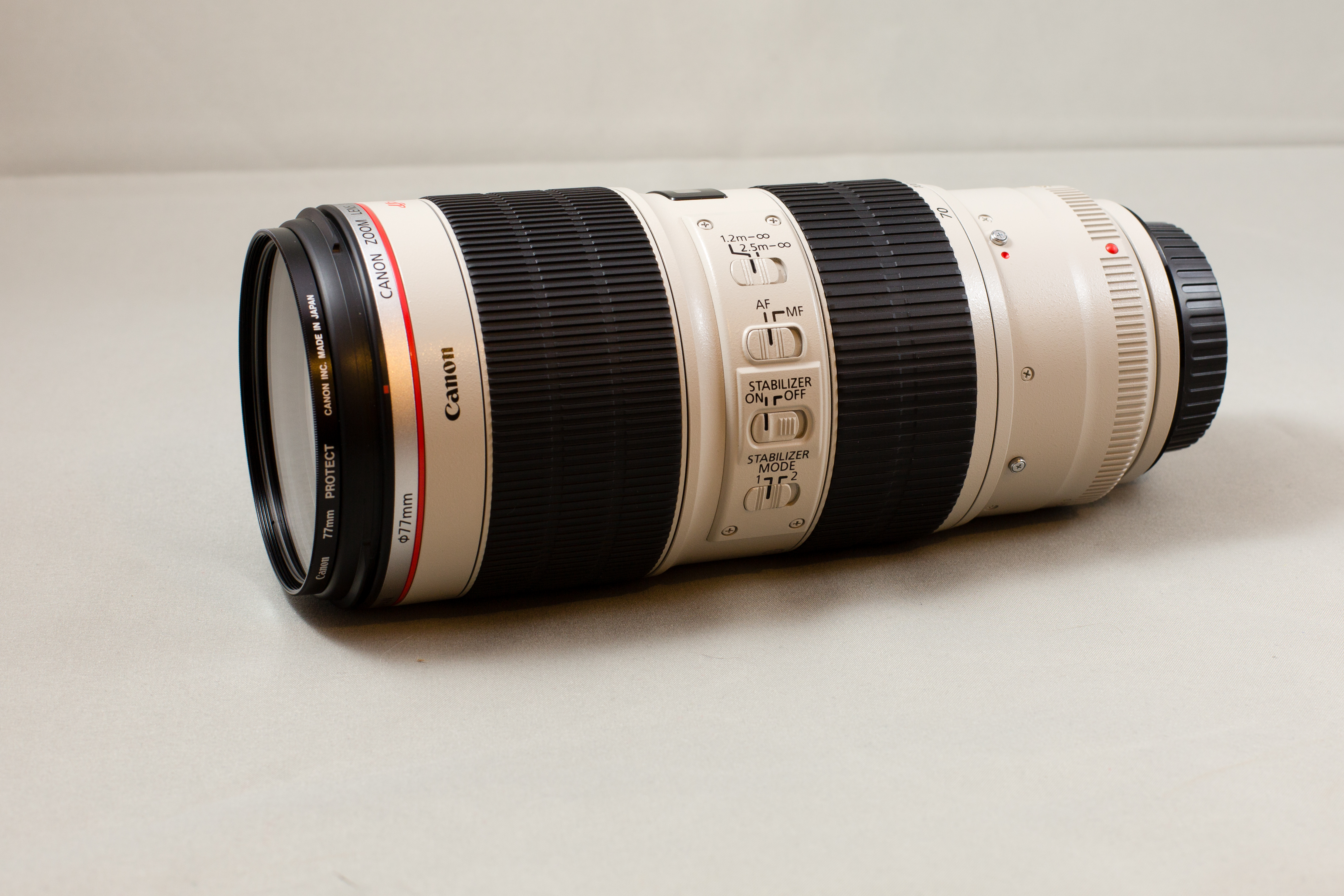 Objectif Canon EF 70-200 mm f/2.8 IS II USM faisant partie du pack Fañch de Wikimédia France.